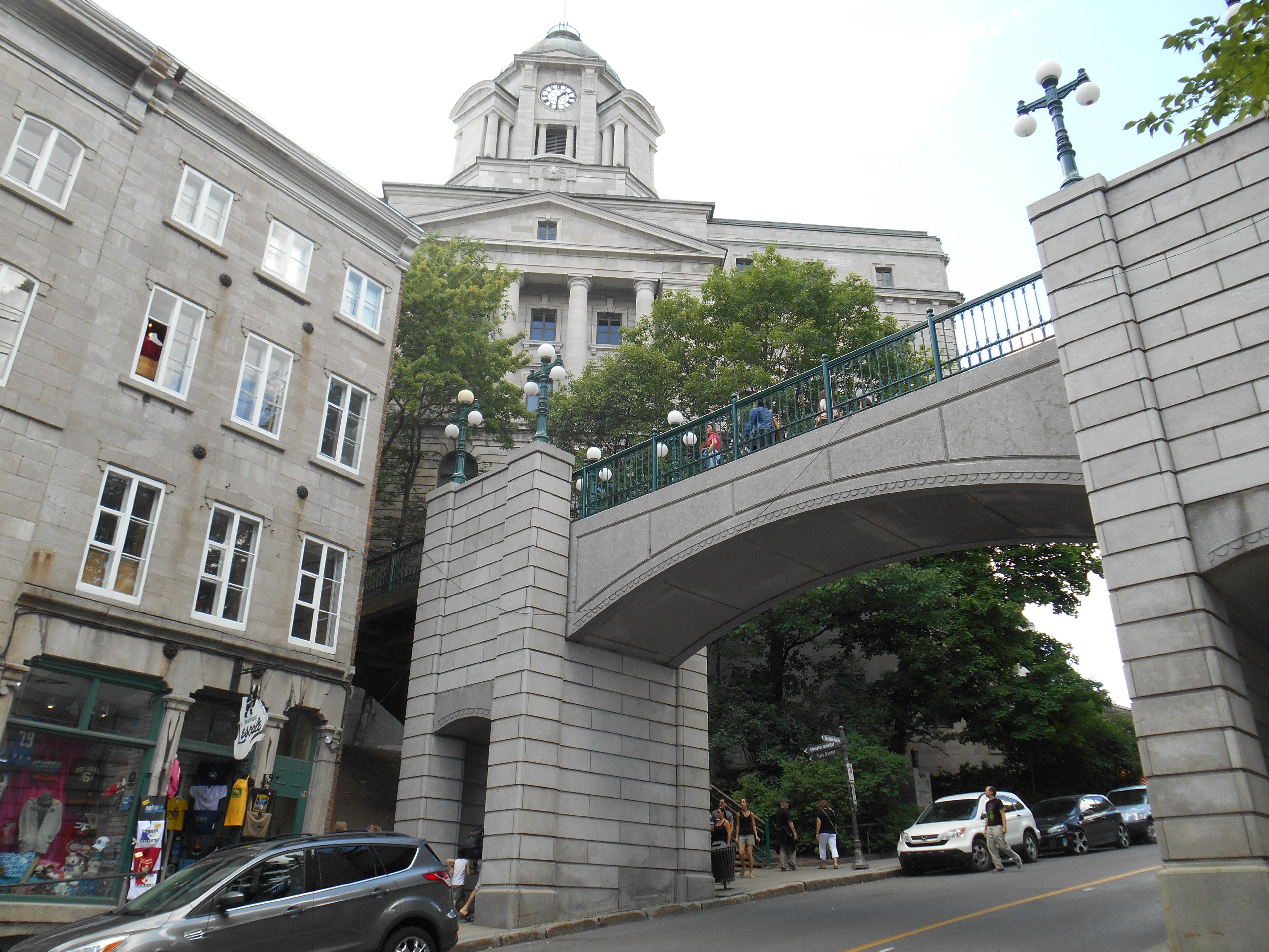 Côte de la Montagne, Québec.